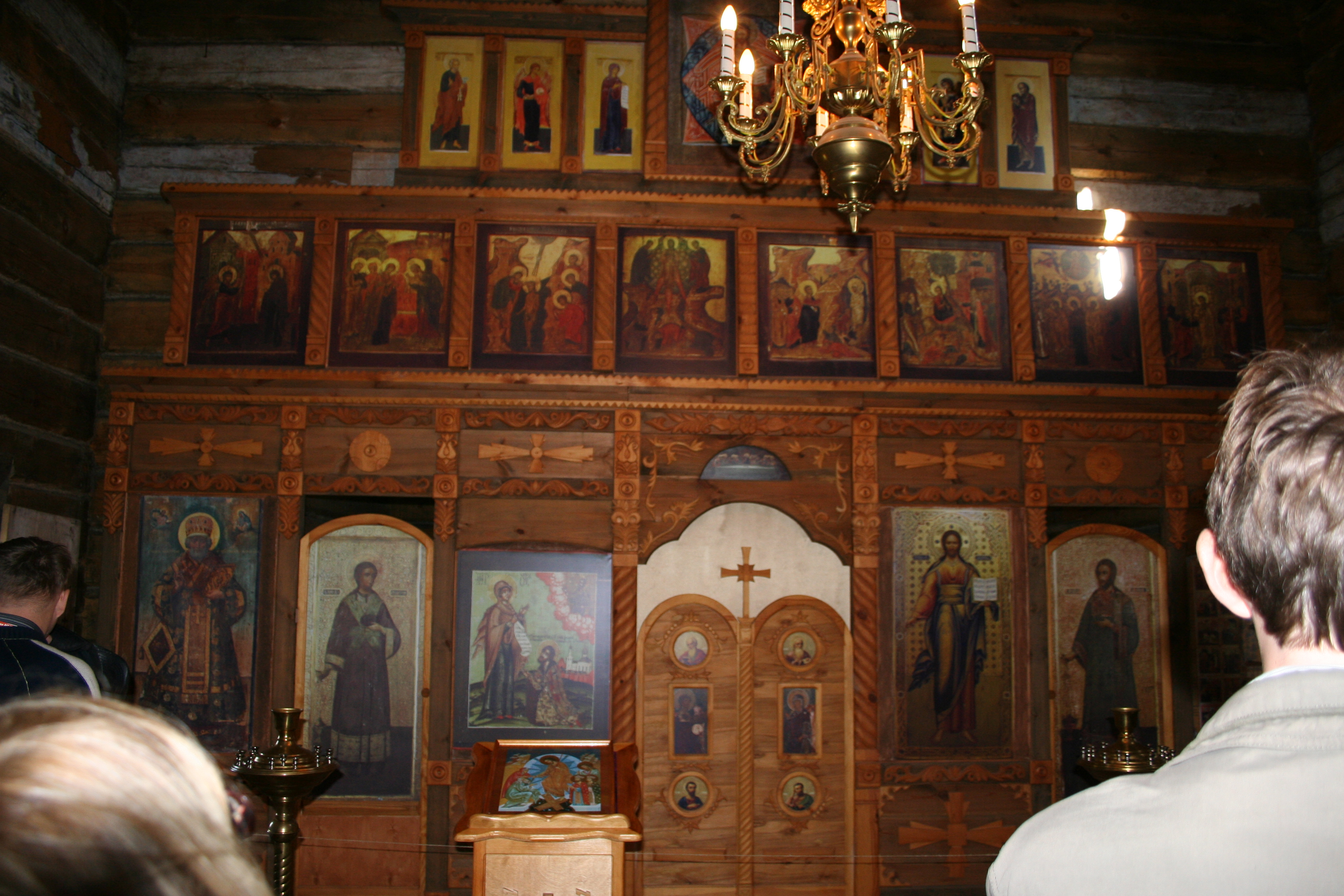 Воскресенская церковь в Суздальсвом музее деревянного зодчества. Иконостас